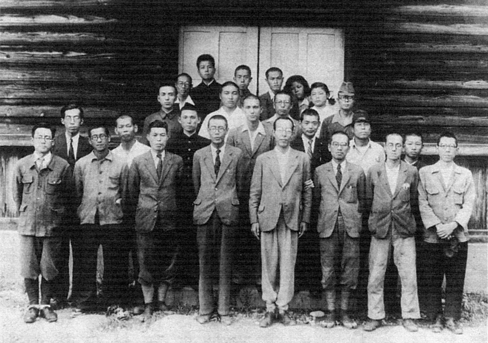 零式艦上戦闘機の設計チーム。前列右から4人目が堀越二郎、その左が曾根嘉年